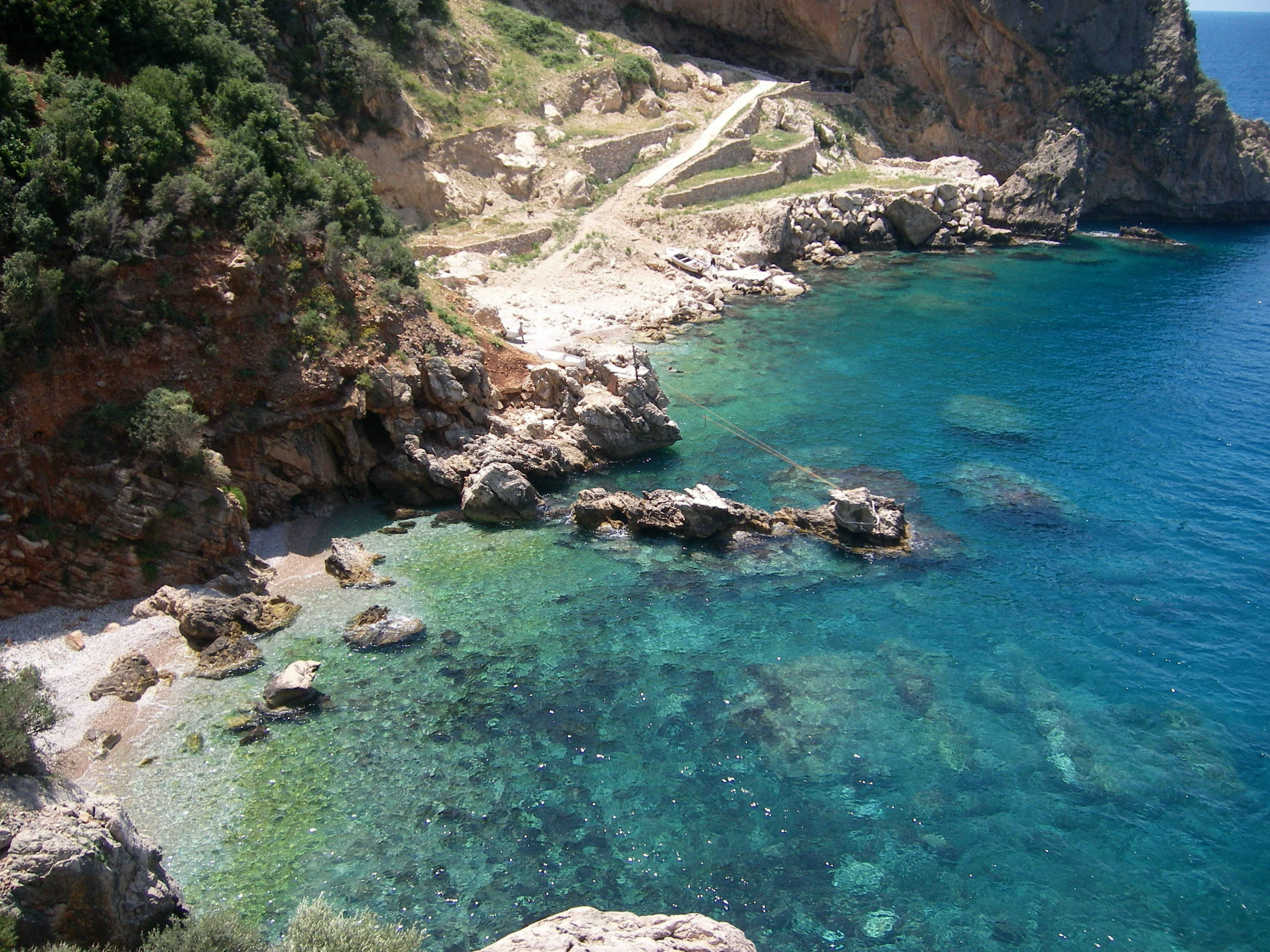 Kara Mağara, Akdeniz kıyısı, Yayladağı